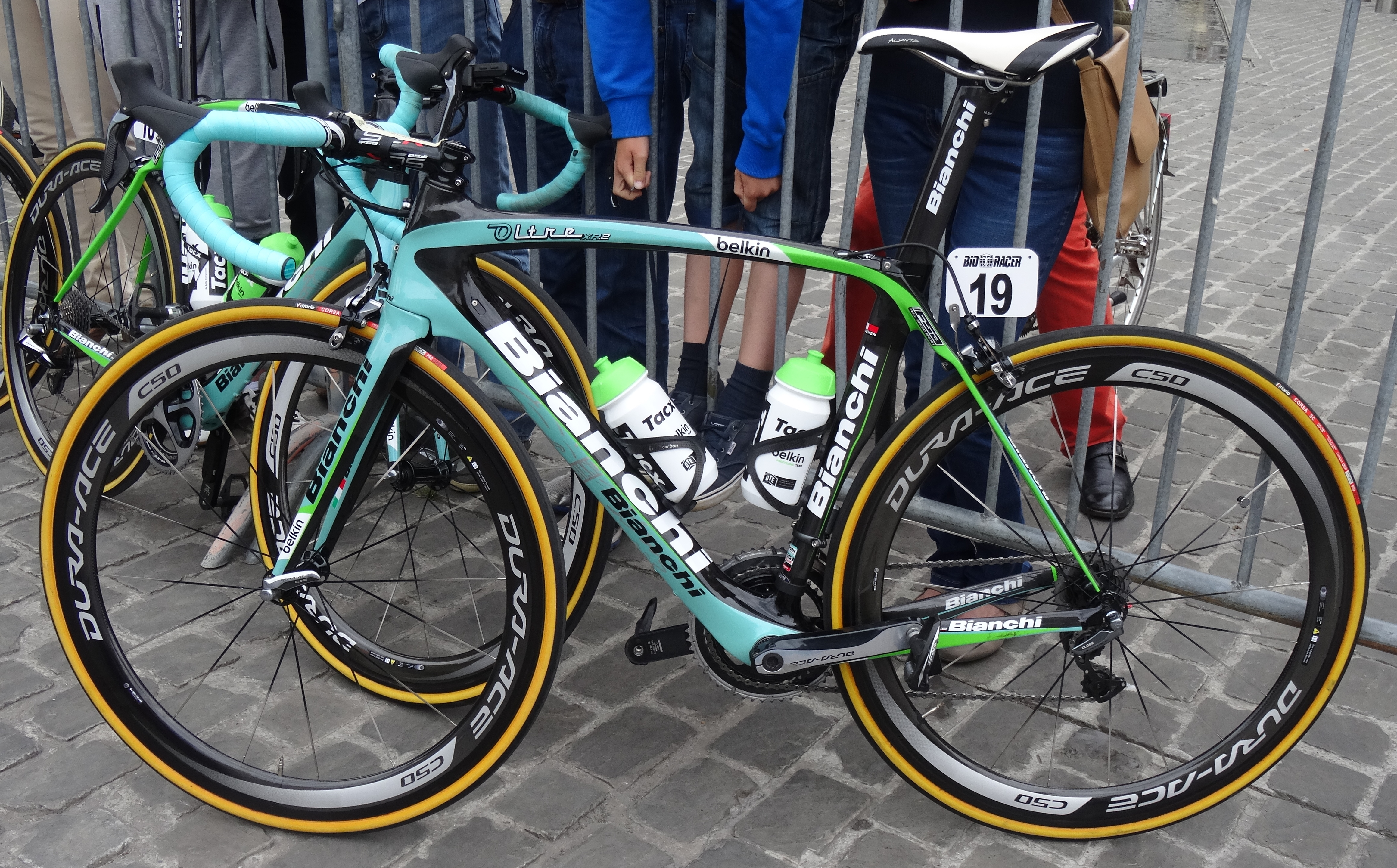 Reportage photographique réalisé le dimanche 15 juin à l'occasion du départ et de l'arrivée du Tour du Limbourg 2014 à Tongres, Belgique.